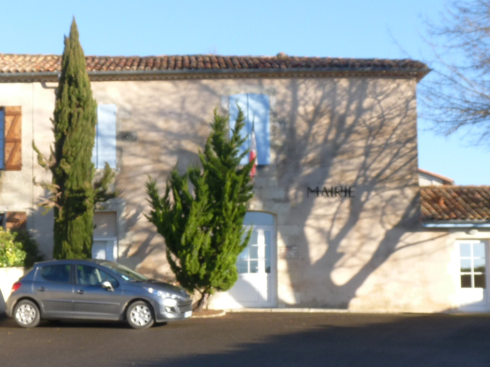 Mairie de Sousmoulins, Charente-Maritime, France